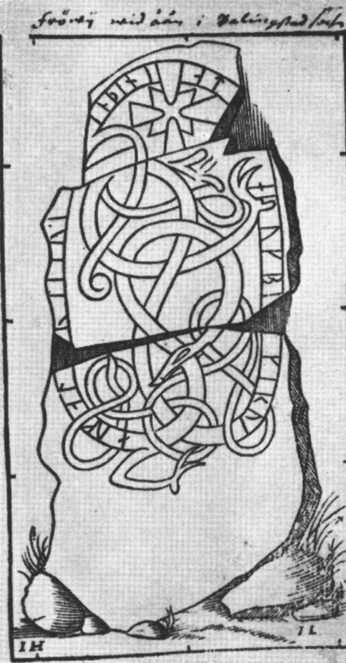 Runinskrift U856, Frövi, Balingsta sn. J Hadorph, träsnitt (i Peringskiölds Monumenta och B 364)